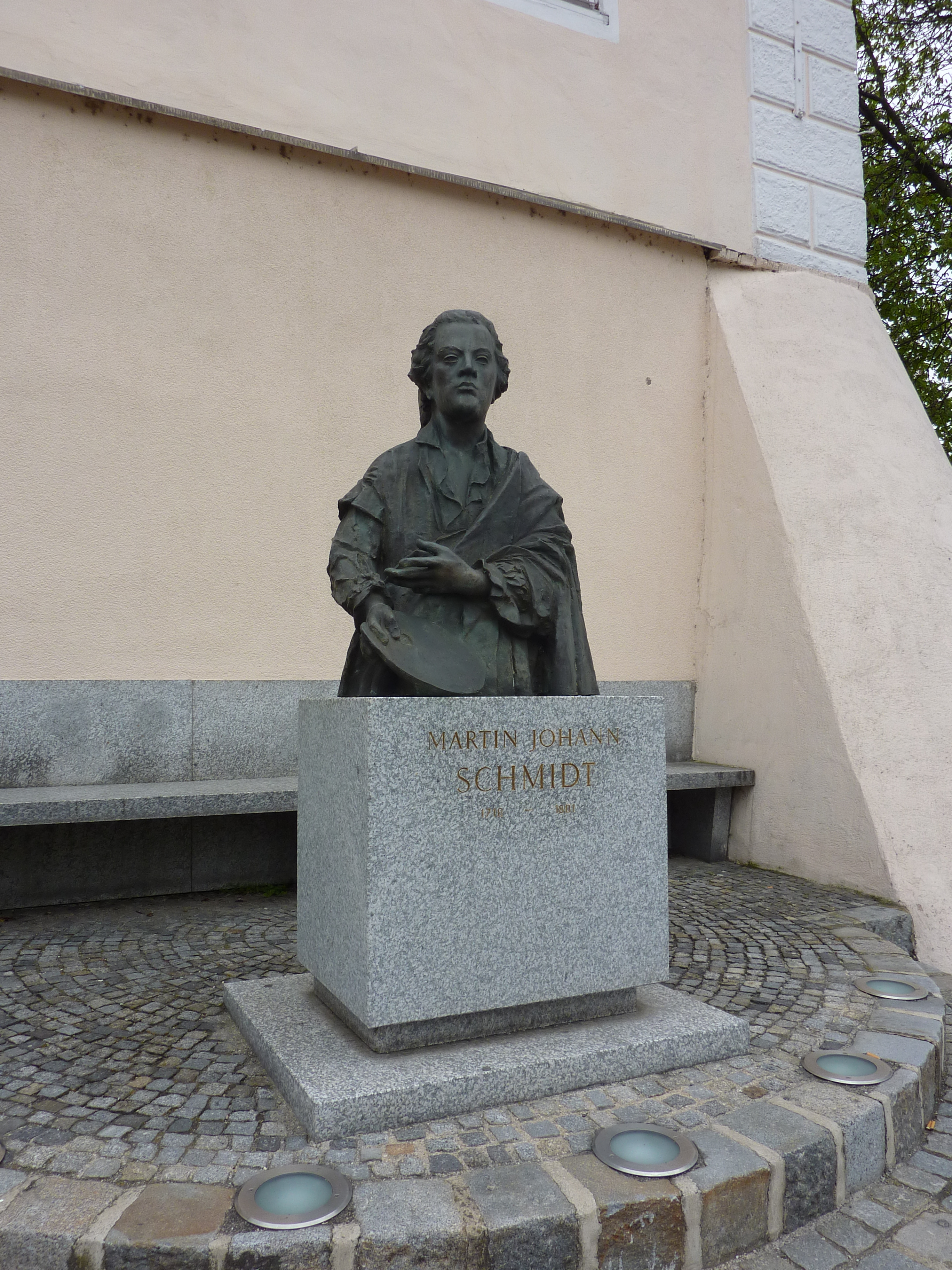 Denkmal für Martin Johann Schmidt (“Kremser Schmidt“) von Hans Freilinger (1994) auf dem Schürerplatz (Ecke Steiner Donaulände) in der Stein (Stadt Krems) in Niederösterreich